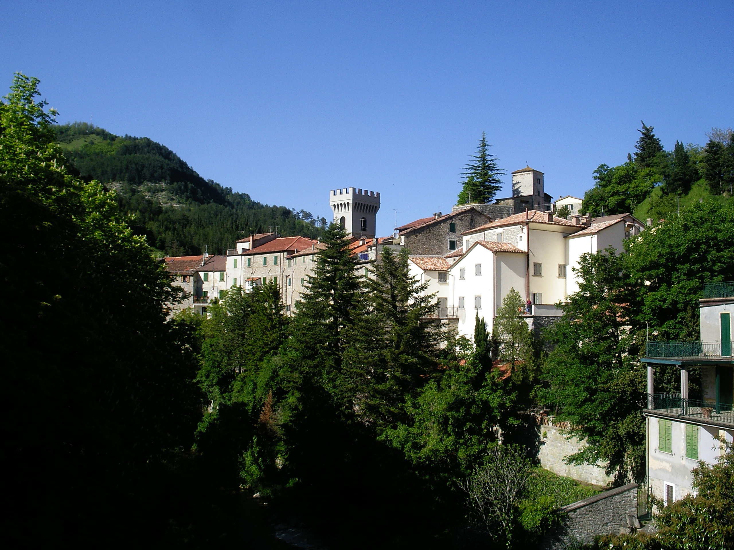 Panorama di Premilcuore